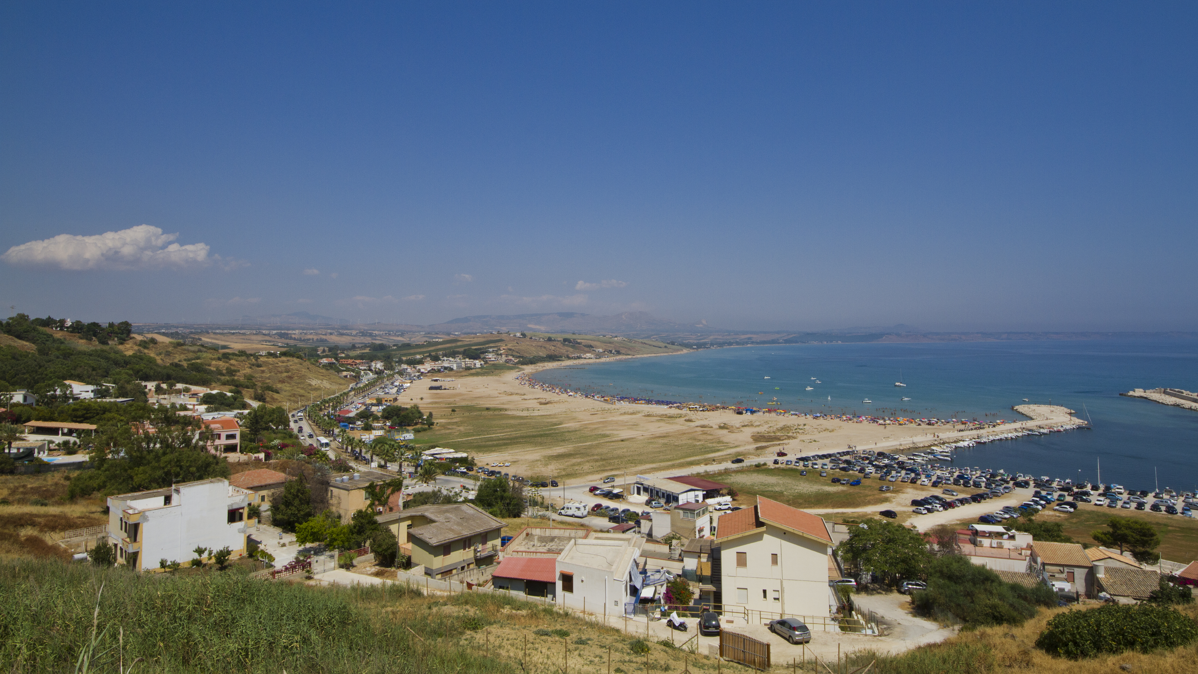 Porto Palo, Menfi, Sicilia, Italia.